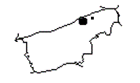 Situació de la masia de Trullars respecte de Calders (Moianès)